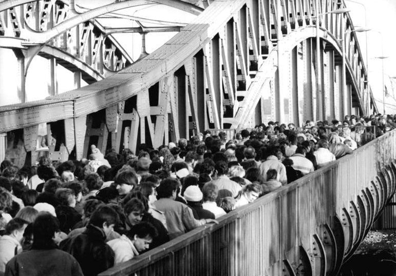 ADN-ZB-Roeske-18.11.89-Berlin: Rund eine Million DDR-Bürger besuchten am Sonnabend Berlin (West). An den Grenzübergangsstellen, wie hier an der Bornholmer Straße wurde zügig abgefertigt. Vom Ministerium des Innern wurden seit dem 9. November weit über 10 Millionen Visa für Privatreisen und über 17500 Genehmigungen für ständige Ausreise aus der DDR erteilt.